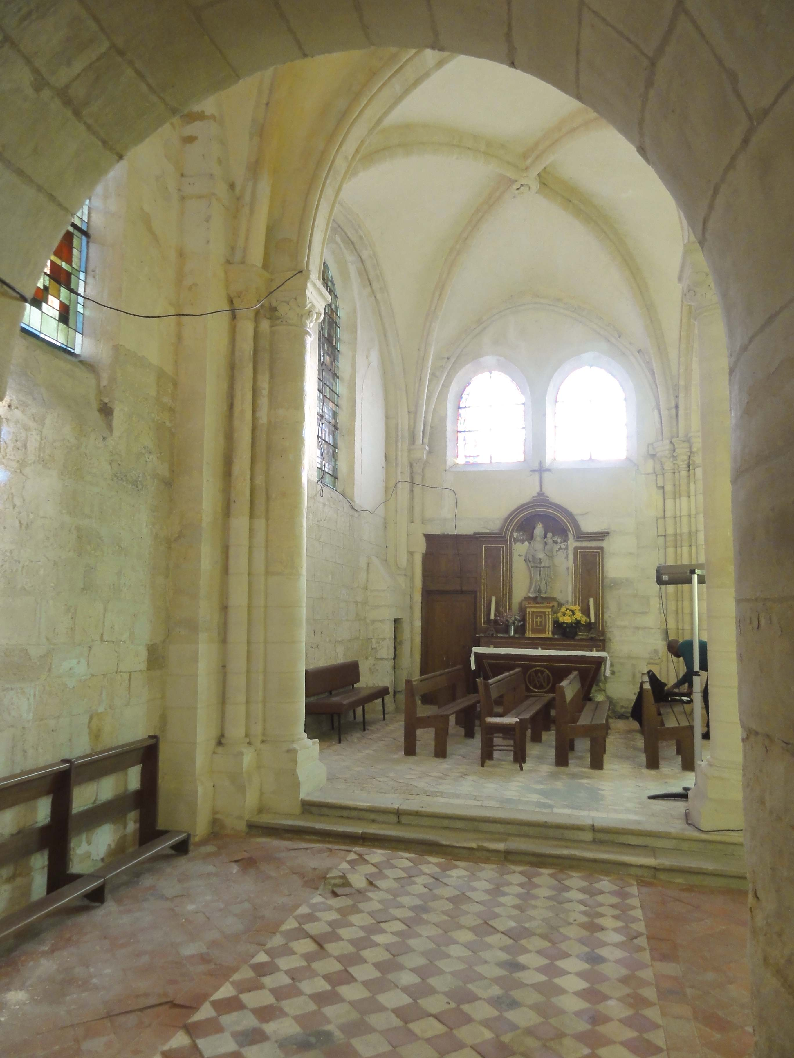 Intérieur de l'église - voir titre.